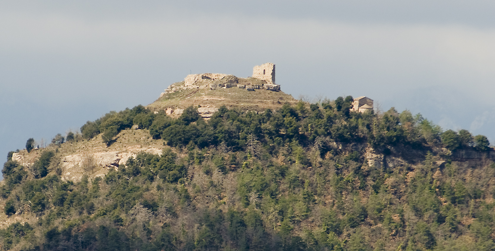 Castell de Lluçà